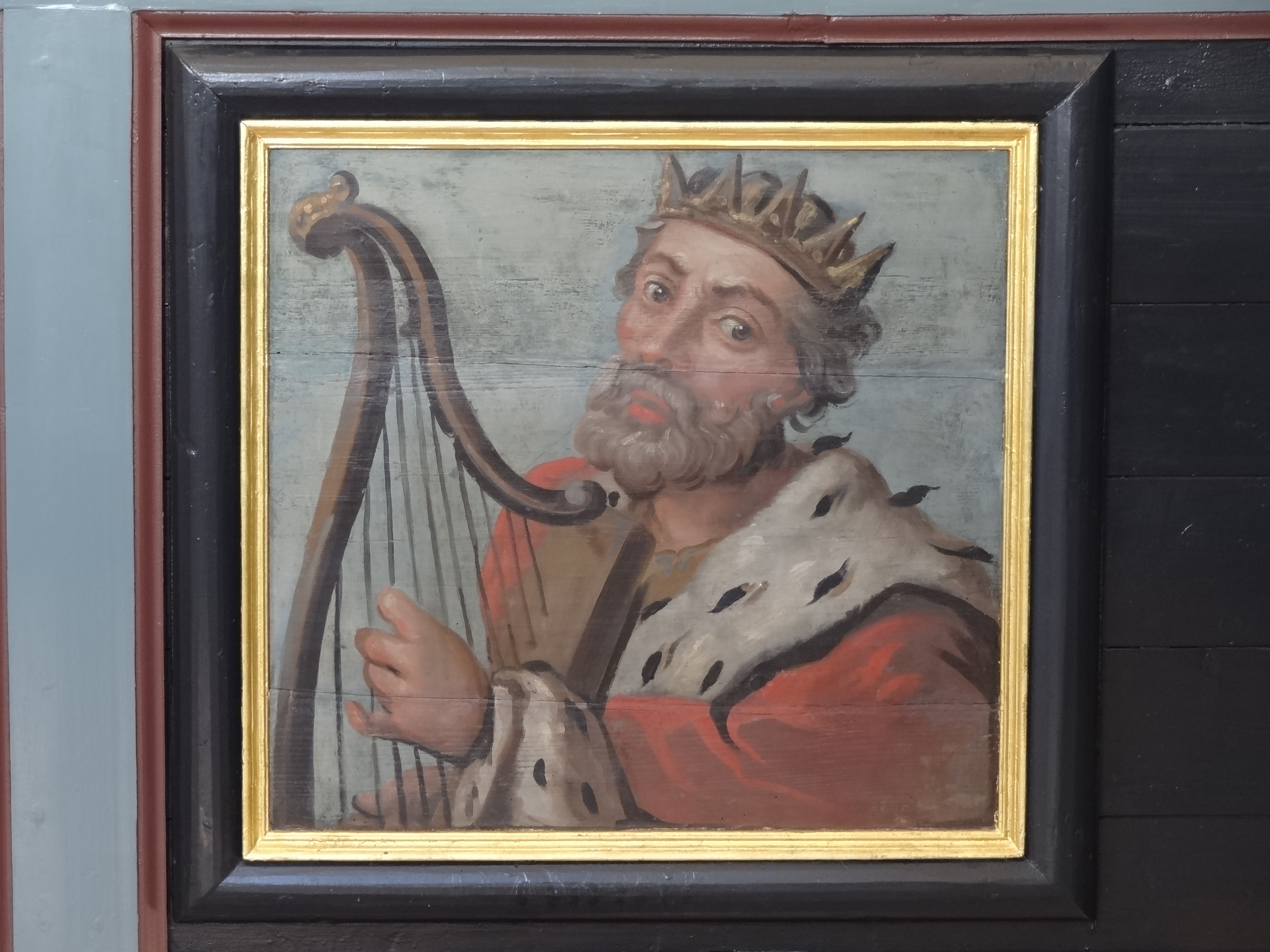 Evangelische Kirche (Reiskirchen)